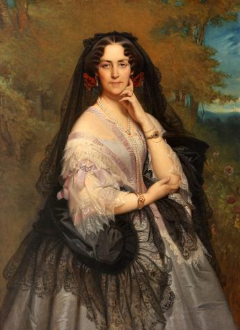 Юсупова Зинаида Ивановна (1809-1893) урожд. Нарышкина.